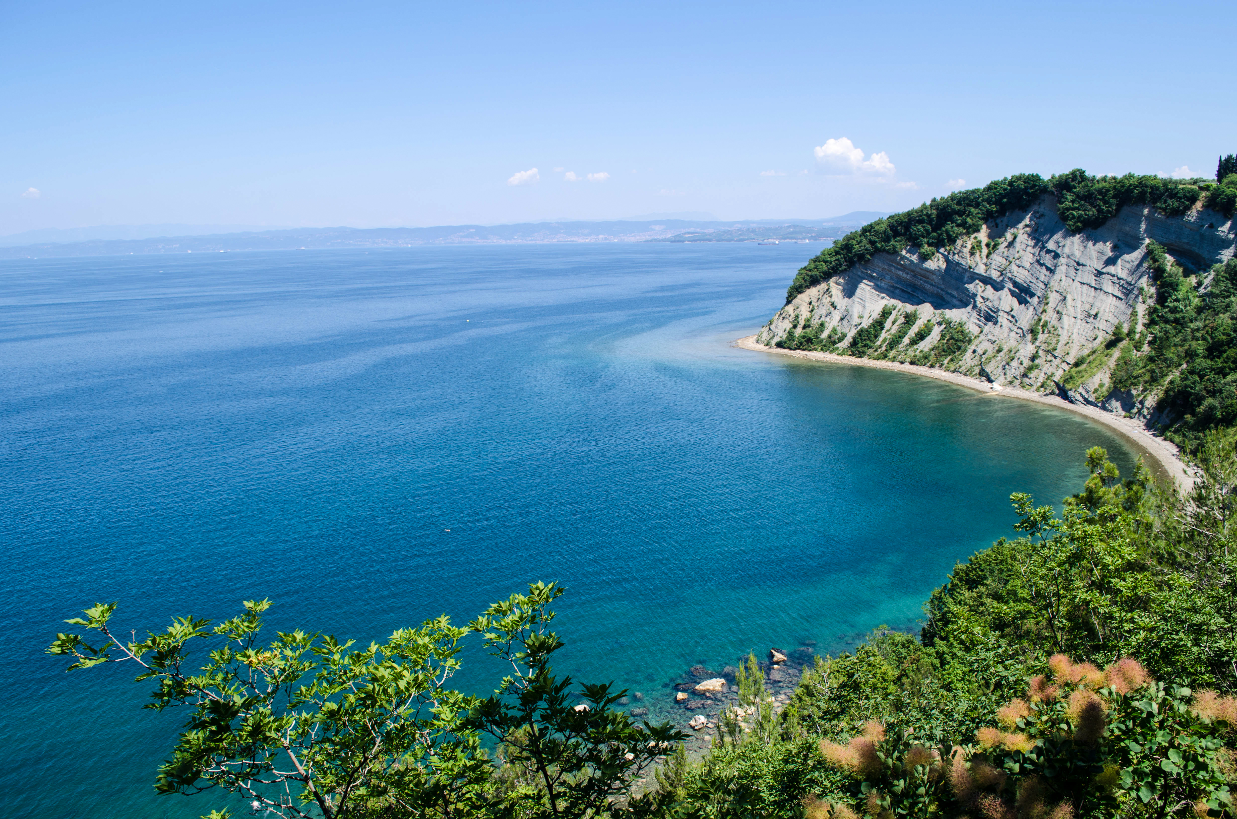 strunjan_bay